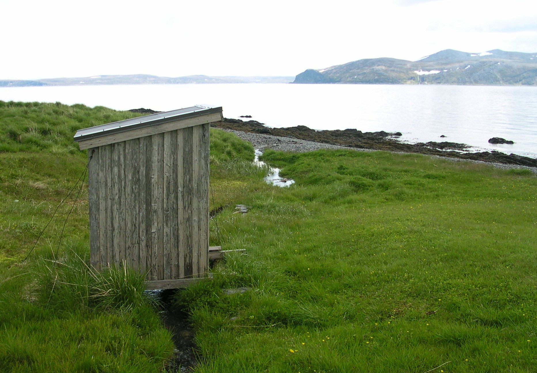 Utedo (eller vannklosett?) på Magerøya i Nordkapp kommune.You are free to use this picture outside Wikipedia (see license), as long as you write: Photo: Arnstein Rønning